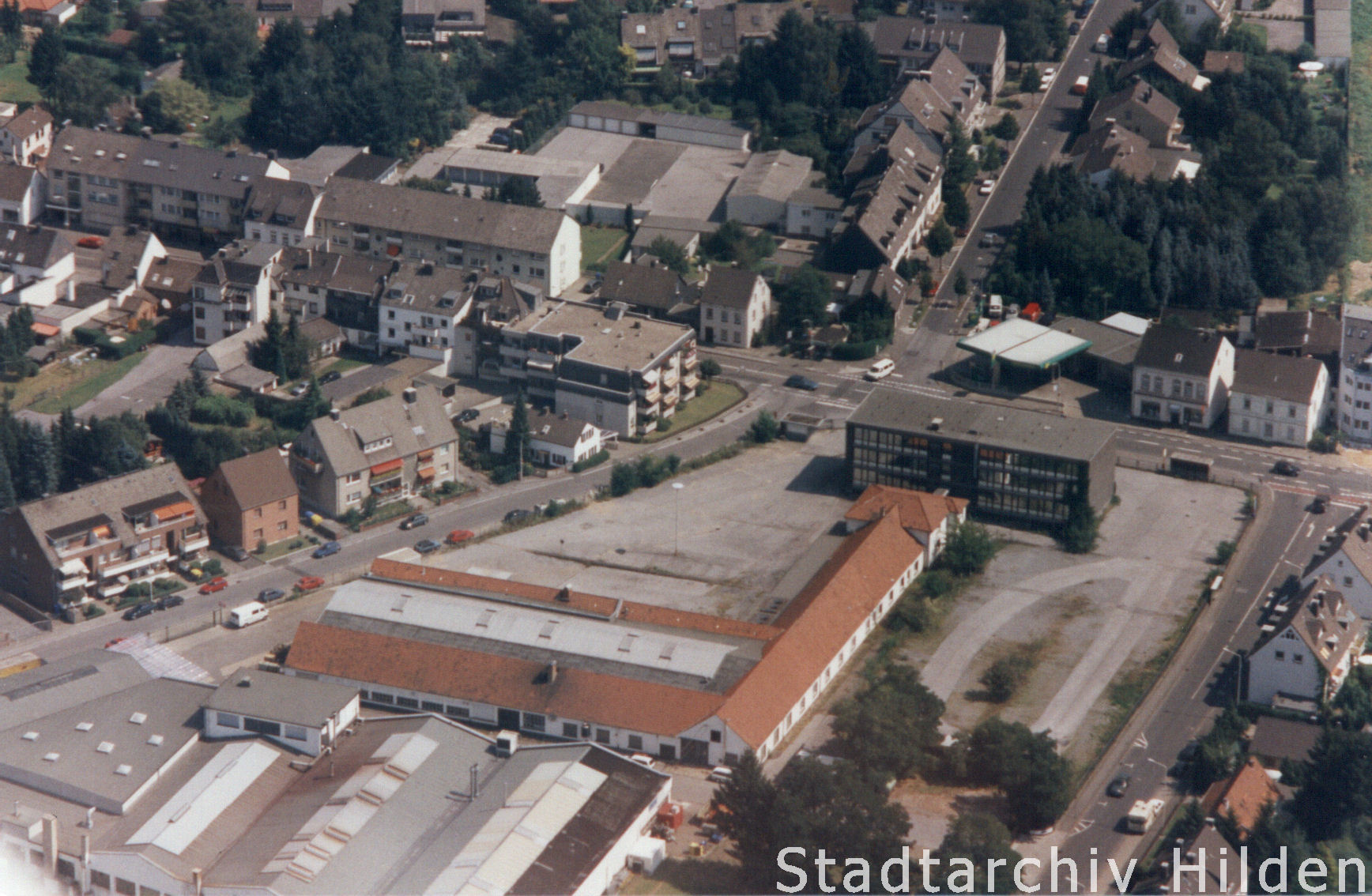 Luftbildaufnahme des Unternehmens Hägglunds-Denison, vormals Maschinenfabrik Hilden